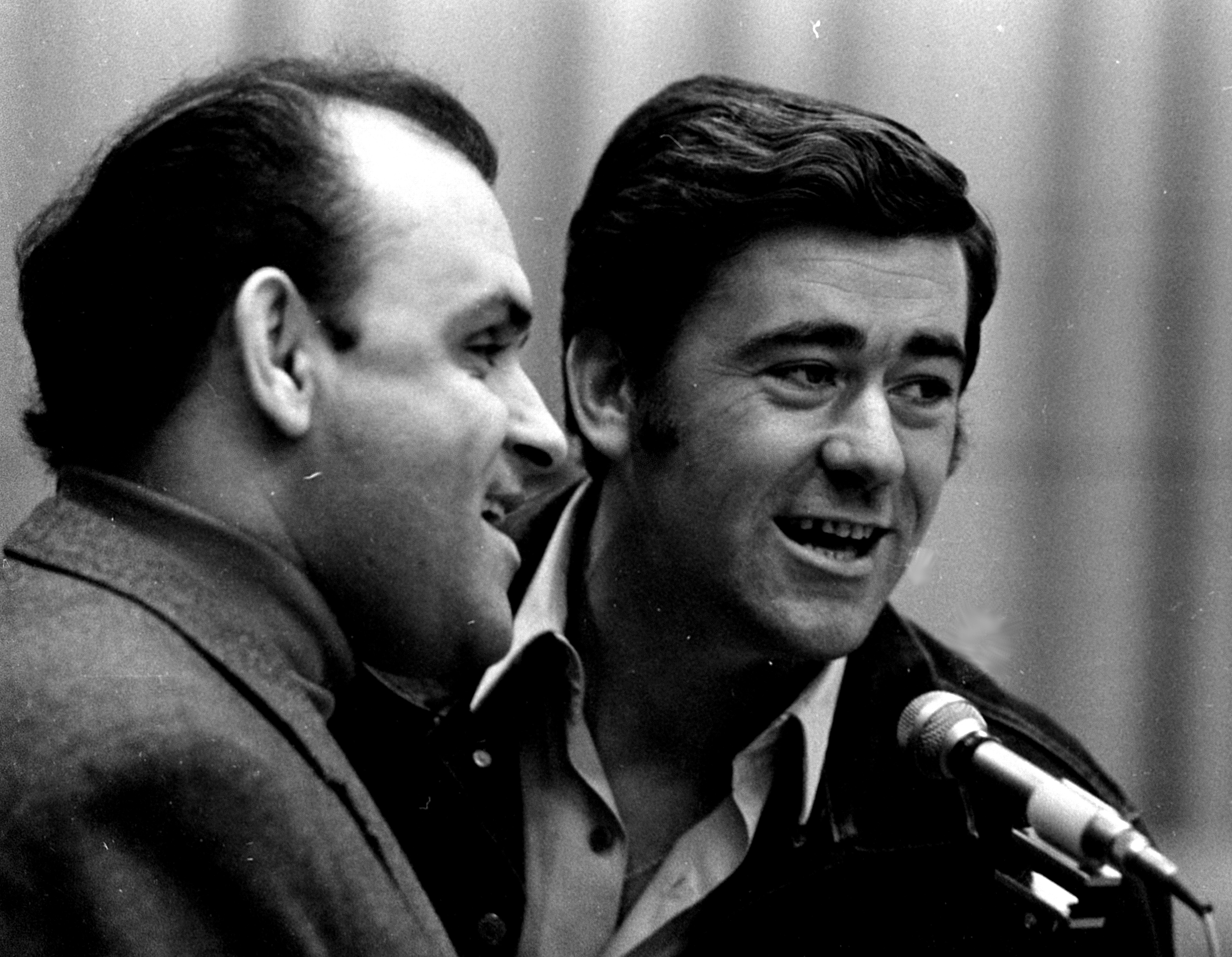 Hofi Géza humorista és Koós János táncdalénekes.